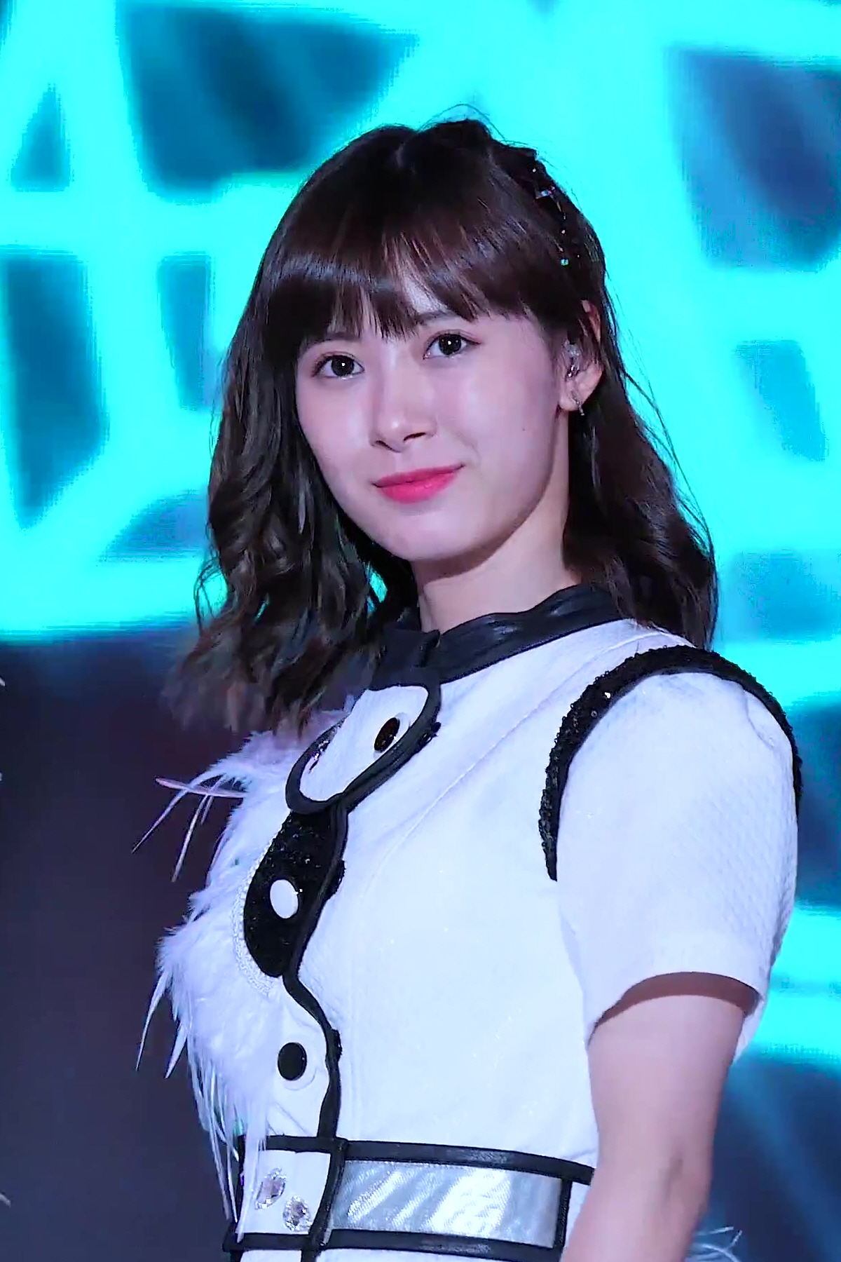 161006 AMN 빅 콘서트 - 마키노 마리아 모닝구무스메 메들리 직캠